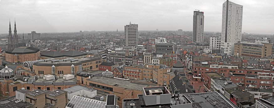 Overzicht van de binnenstad van Eindhoven met de Heuvelgalerie (linskvoor), de Sint-Catharinakerk (daarachter), in het midden Hooghuis en dan rechts de torens de Regent en de Admirant